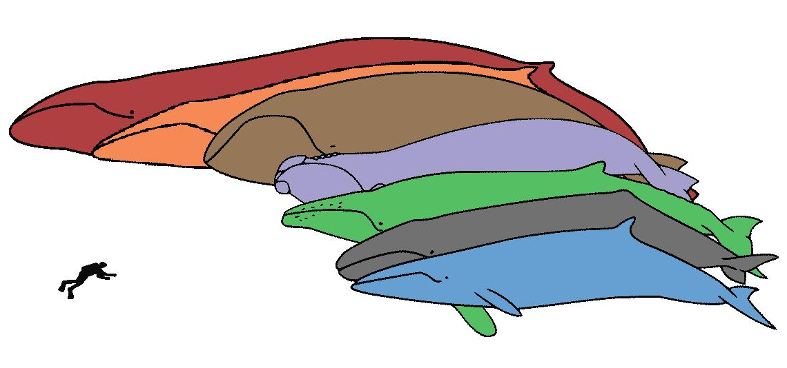 Untagged version of Baleen whale sizes.JPG